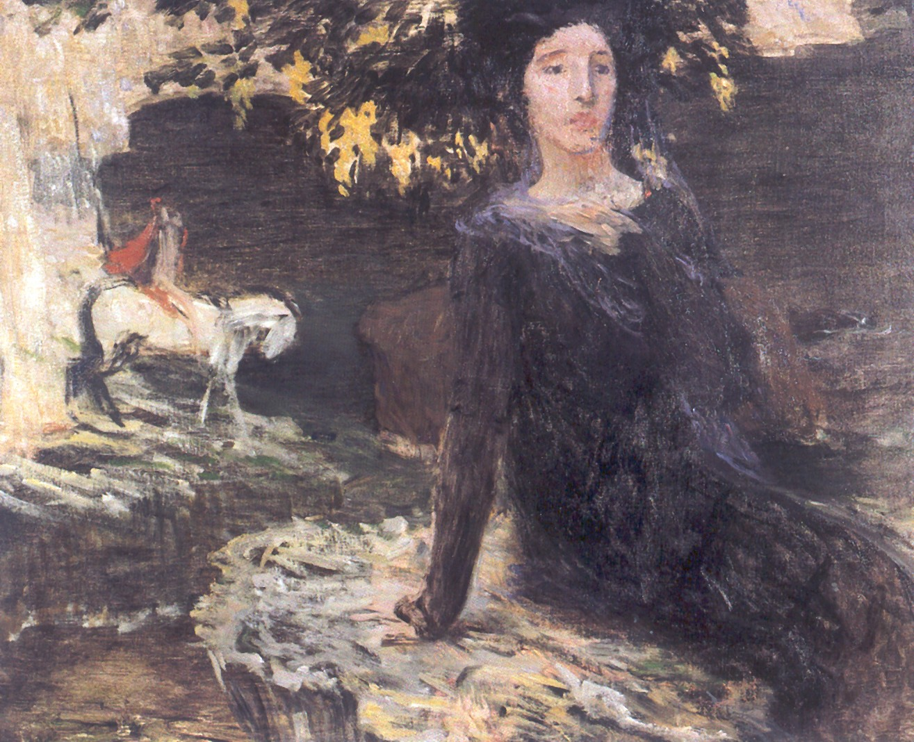 Jan Preissler: Žena a jezdec u Černého jezera. Olej na plátně. 1903 - 1904. 61 x 75,5 cm. České muzum výtvarných umění.